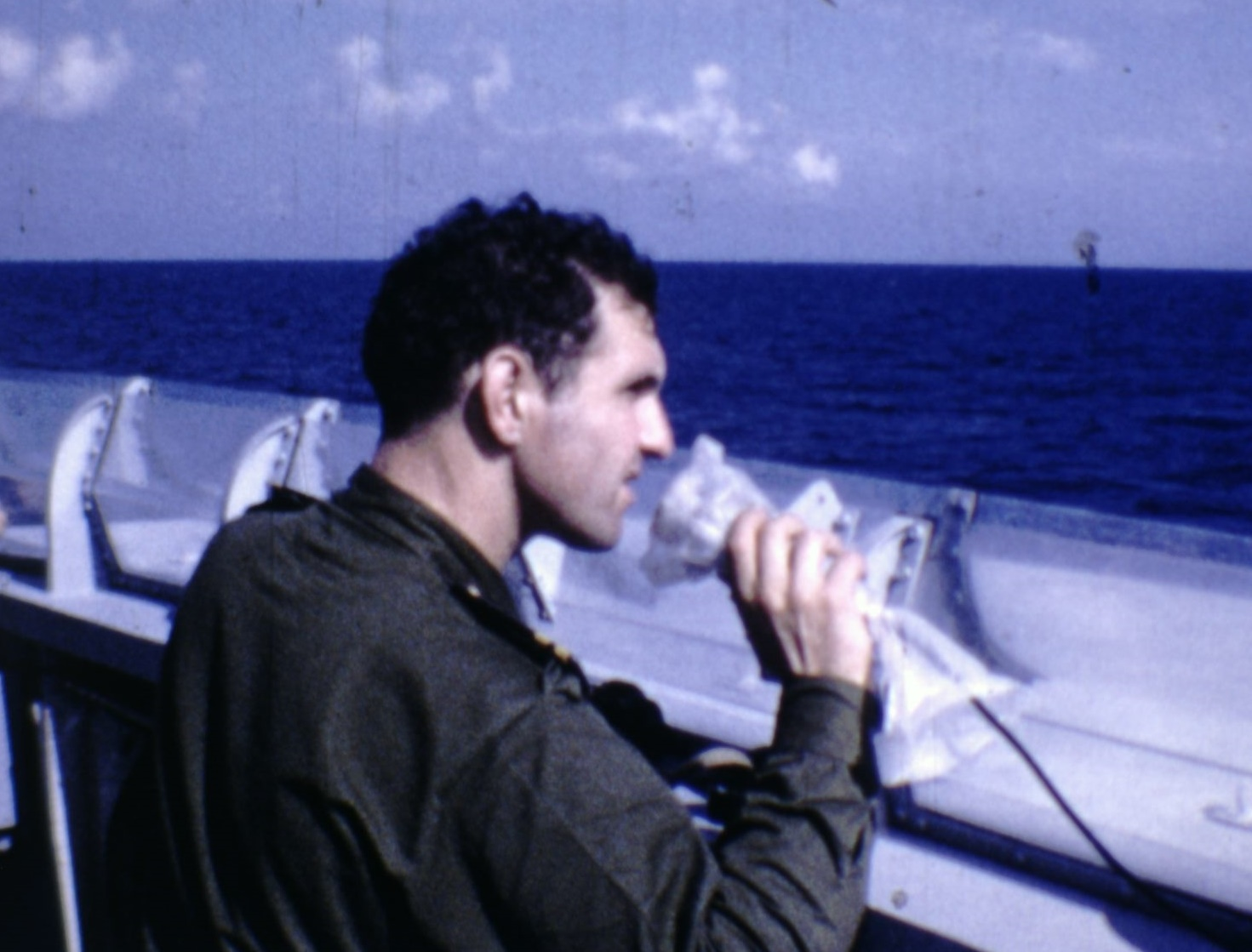 סרן משה אורון בגשר אח"י חיפה (סער 2) בדרך משרבורג לישראל